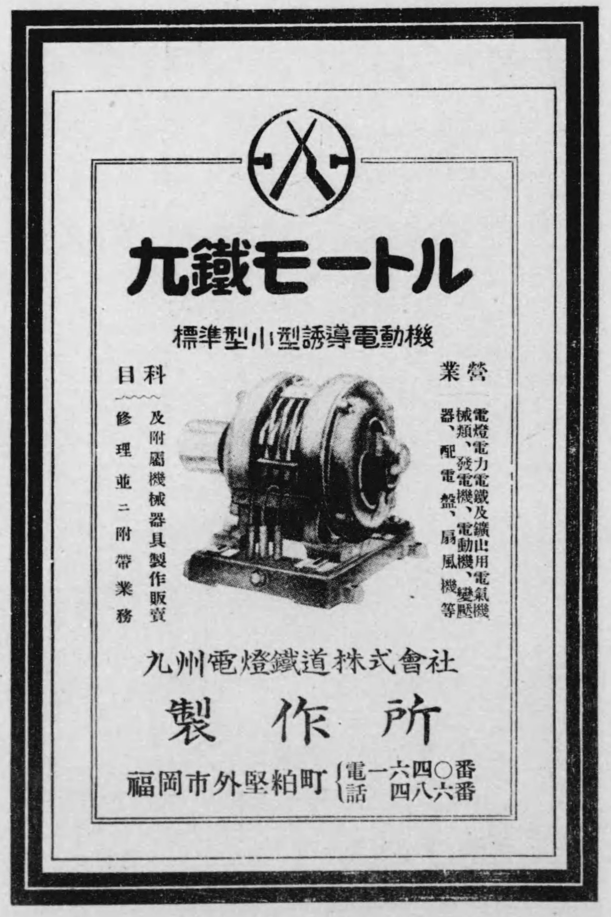 九州電灯鉄道株式会社（製作所）の広告